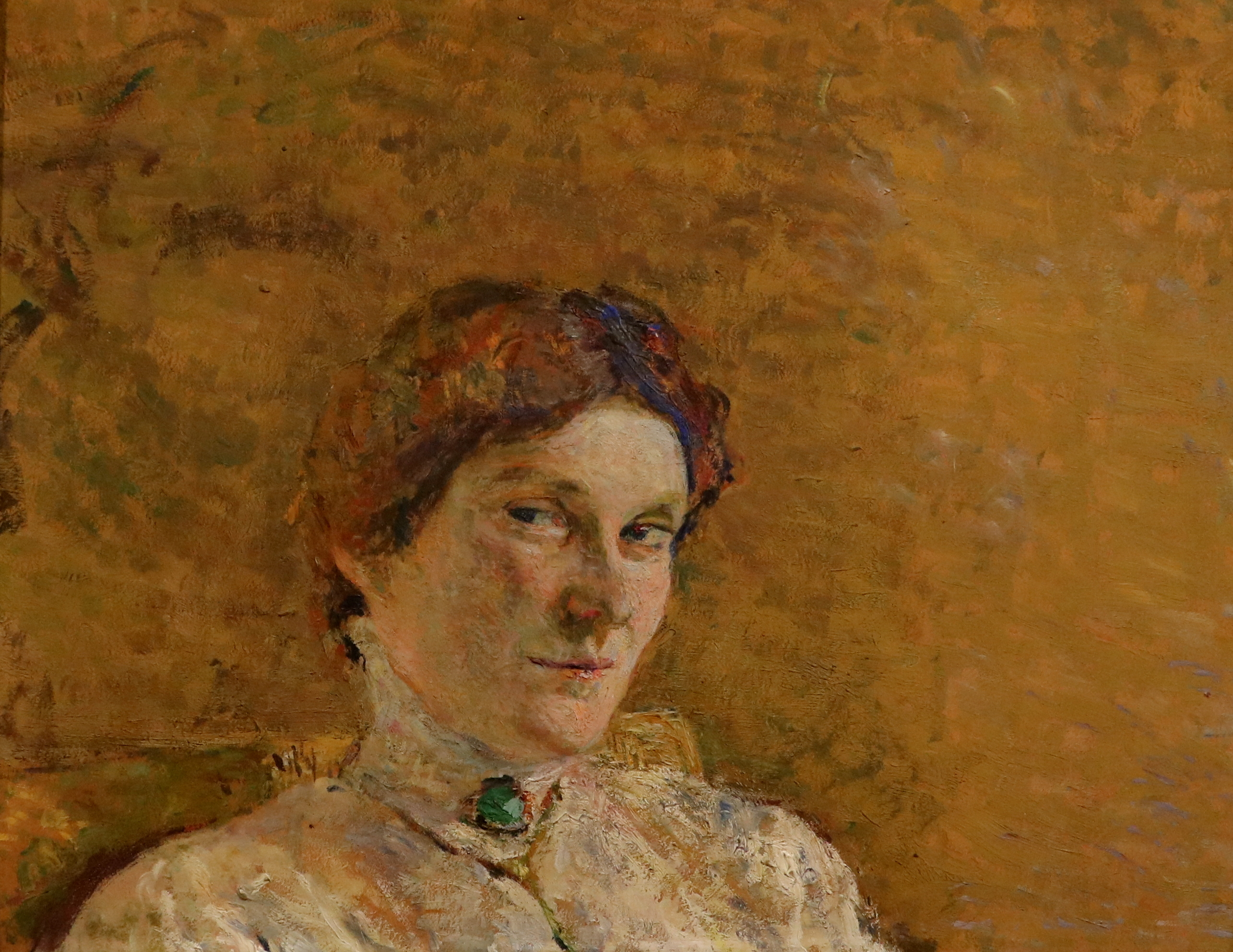 Portrait de l'actrice Suzanne Desprès par Édouard Vuillard (1908) Huile sur carton Inv. 75. 1. 21 Dépôt du musée national d'Art moderne, 1974. Musée des Beaux-Arts de Caen, 2017.